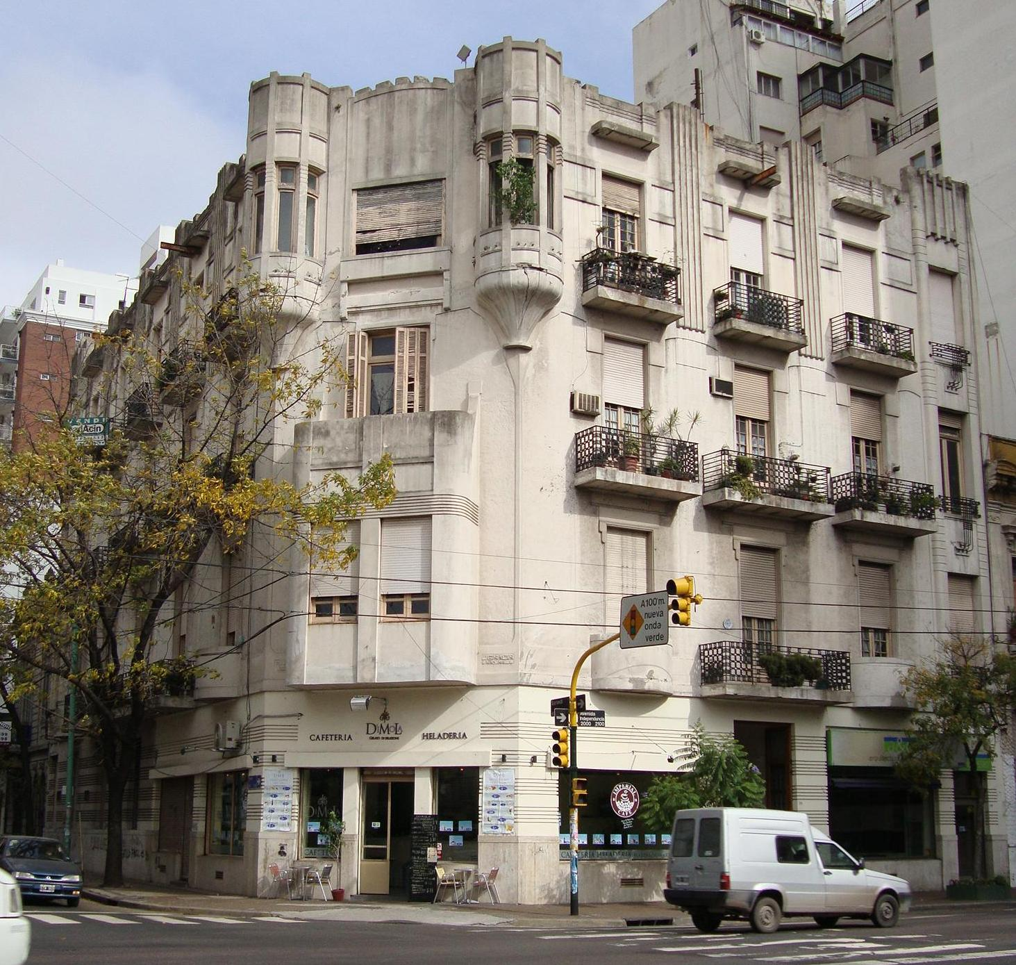 Edificio de viviendas, originalmente propiedad de la Sociedad Española de Beneficencia. Arquitecto: Julián García Núñez Estilo: Modernismo Catalán Año: 1913 Avenida Independencia esquina Sarandí, Buenos Aires.